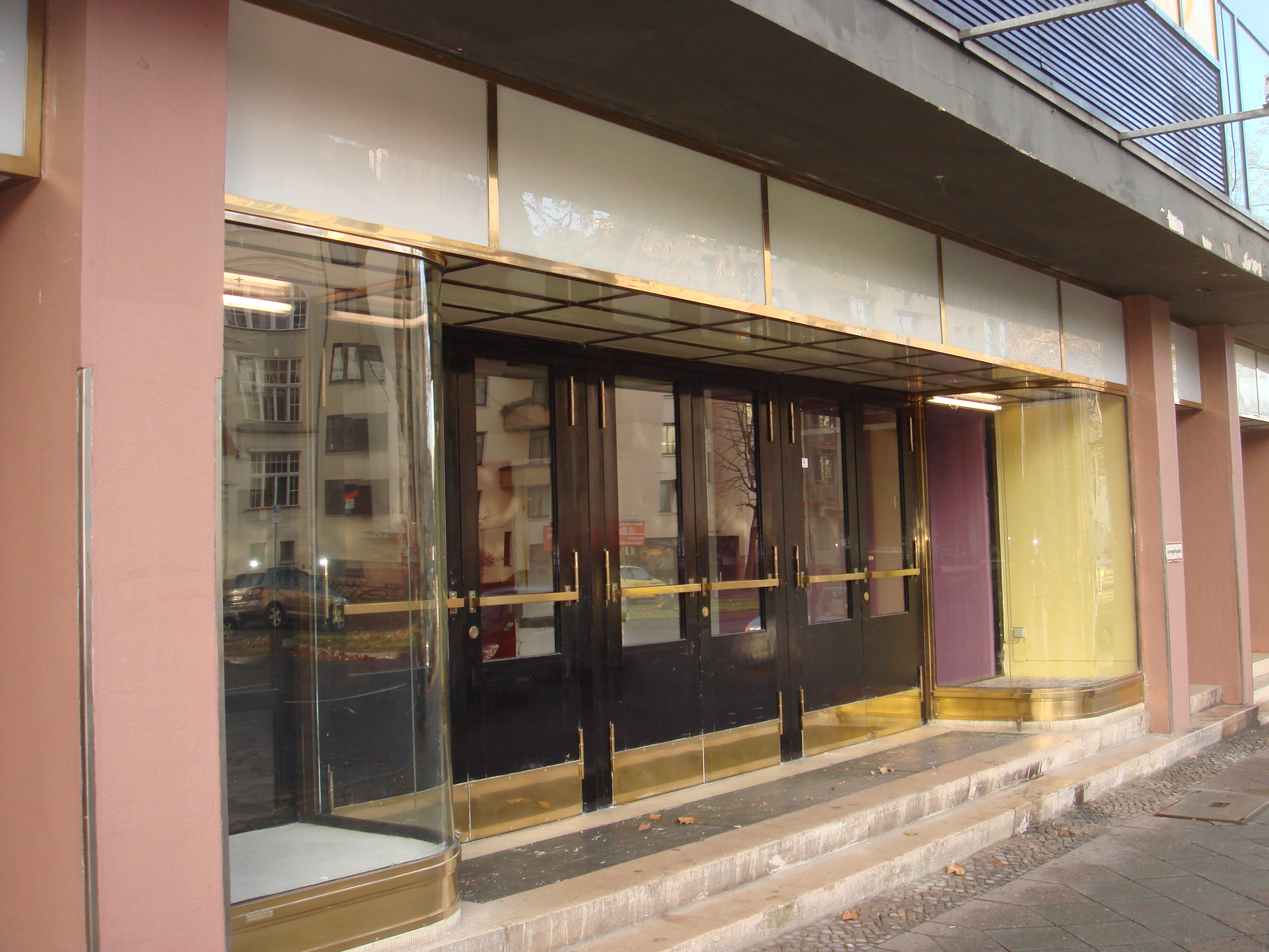 ehemaliger Kinoeingang des Roxy-Palastes in Berlin-Friedenau